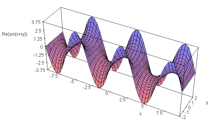 Re(sin(x+iy))